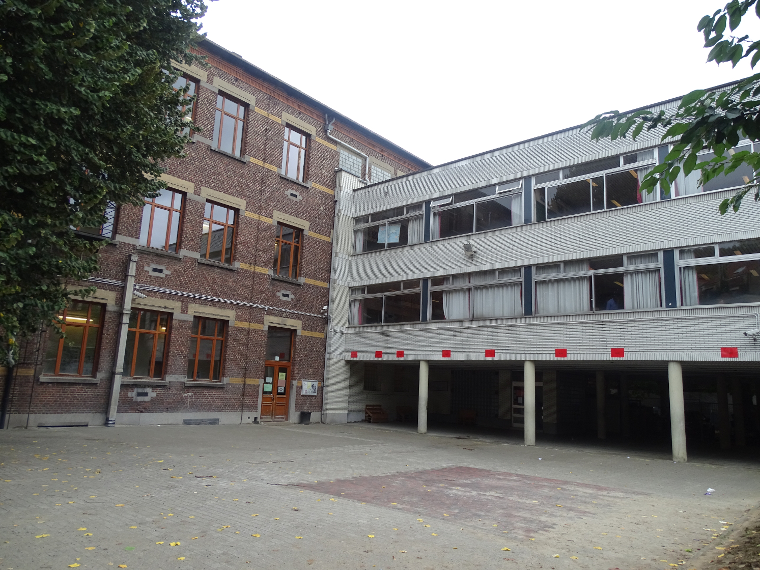 Vue de la seconde extension de l'Athénée Joseph Bracops (1975).